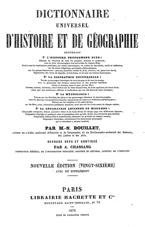 "Dictionnaire universel d'histoire et de géographie" by Marie-Nicolas Bouillet (1798-1865). 26th edition, 1878.